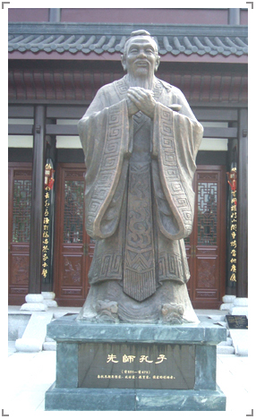 石鼓书院孔子雕像，位于大观楼前。